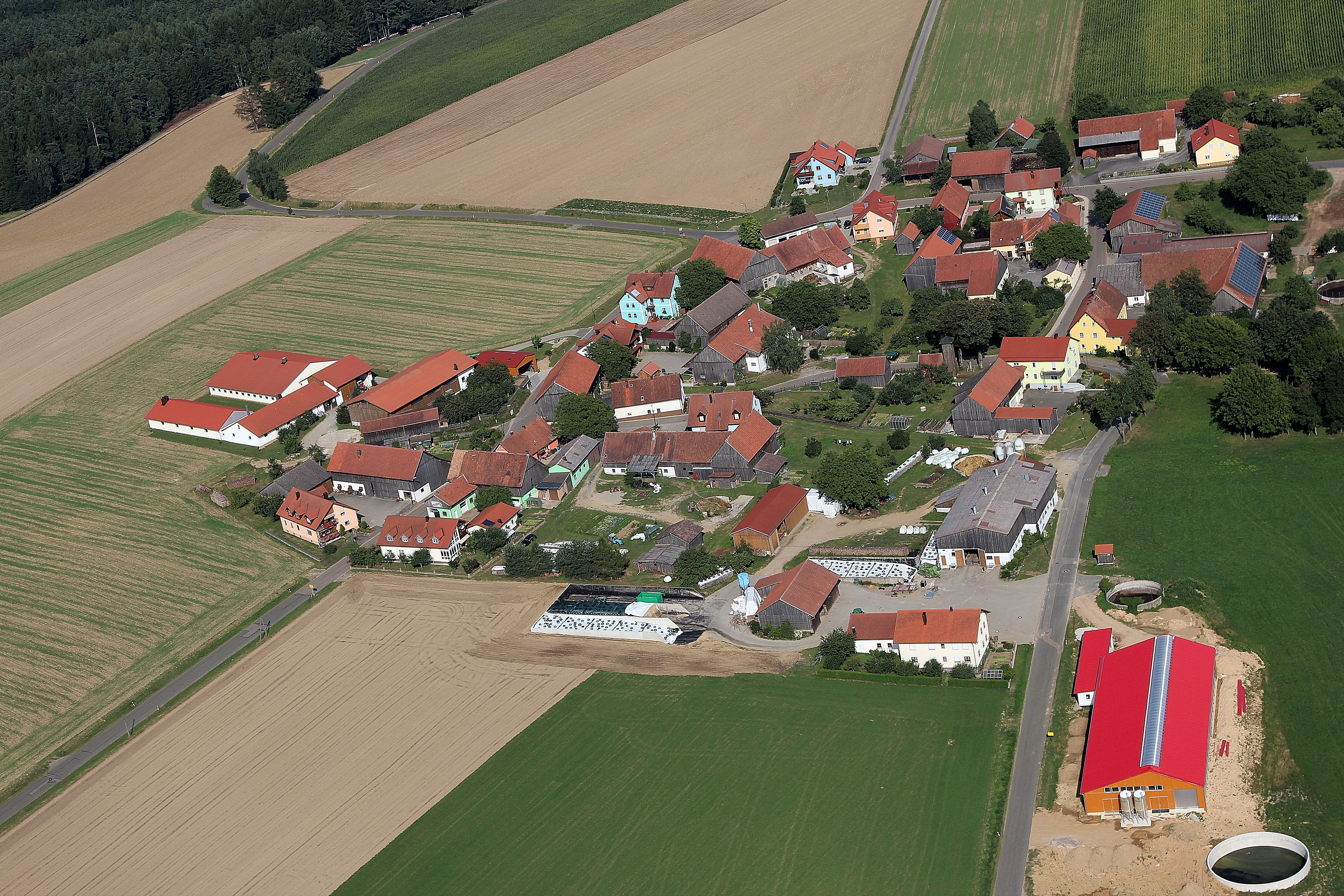 Wagnern, Gemeinde Niedermurach, Landkreis Schwandorf, Oberpfalz, Bayern